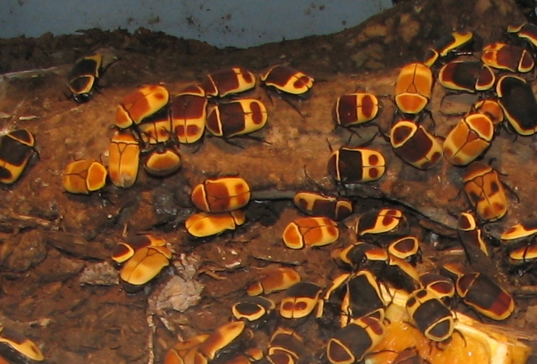 Taxicab Beetle Pachnoda marginata peregrina